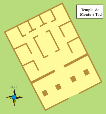 Plànol del temple de Montu a Tod (Tifium)